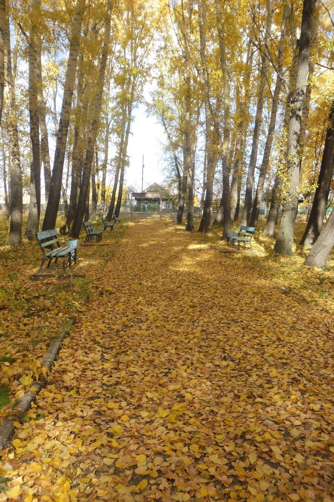 Бея, осень 2012 года. Парк Молодёжный (Комсомольский).